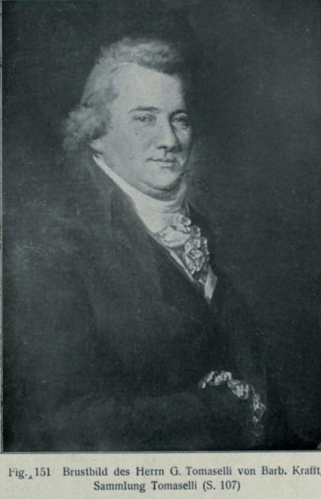 Ritratto del tenore Giuseppe Tomaselli verso 1815 da Barbara Krafft